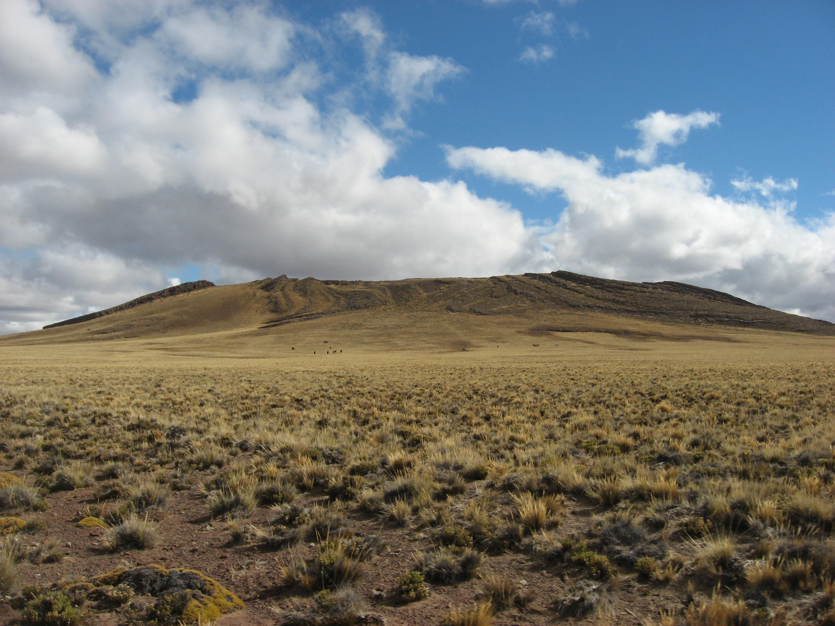 Montaña, en la Meseta de Somuncurá.